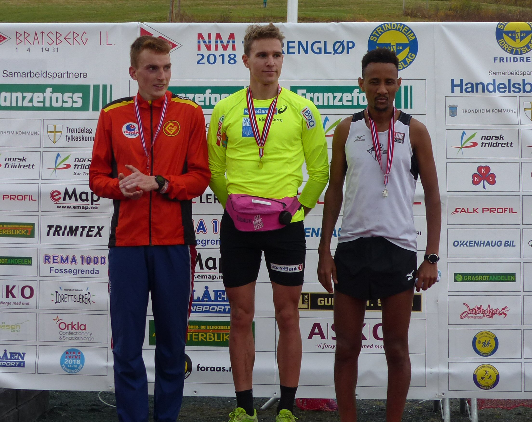 NM i terrengløp, lang løype, Bratsberg - Trondheim, 2018. Seierspallen for menn senior.